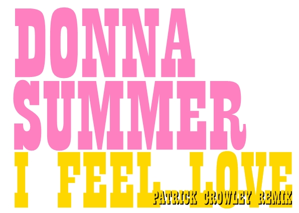 logotipo de "i feel love(patrick crowley rmeix)